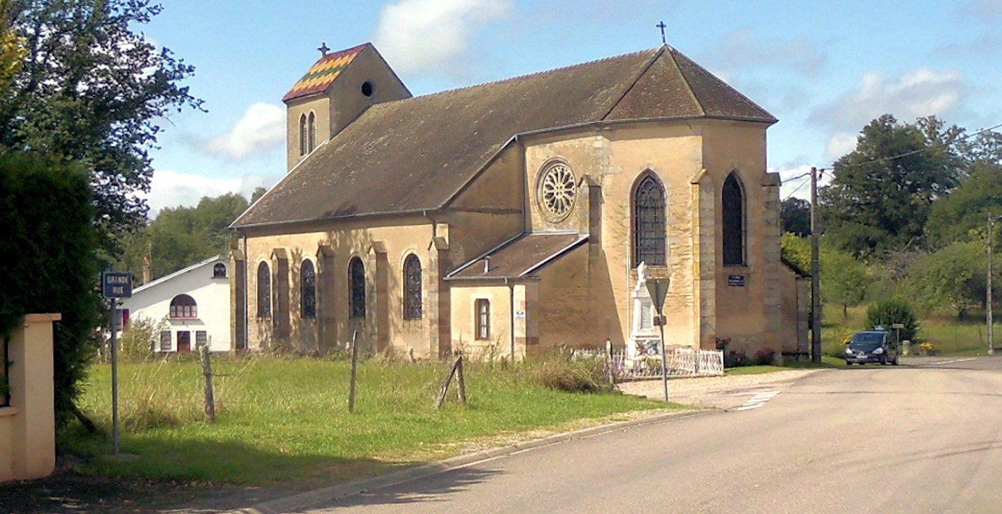 L'église de la Nativité-de-Saint-Jean-Baptiste de Pont-du-Bois